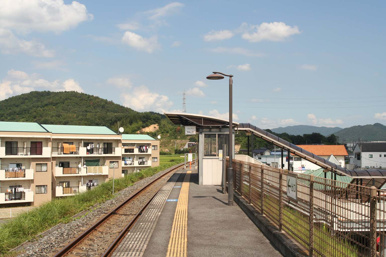 小田駅の構内